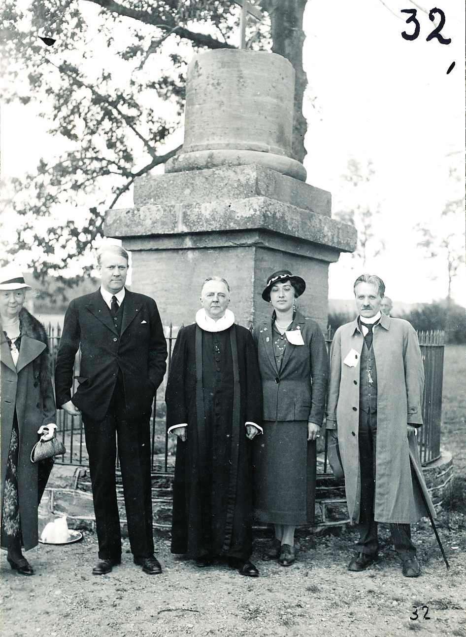 Foto fra albumet «Stiklestad, Nasjonal Samling, Olsok-Helgen 28.–29. juli 1934» (opprinnelig lasta opp til Flickr av Riksarkivet) Foto: Schrøder. For å lese om Nasjonal Samlings 2. riksmøte på Stiklestad 26.–29. juli 1934, se for eksempel Program for Nasjonal samlings 8. riksmøte 1942 side 13. Partilederen Vidkun Quisling, garnisonprest Kjeld Fredrik Karl Stub (se Den norske nasjonalsosialismen side 63) og andre talte.